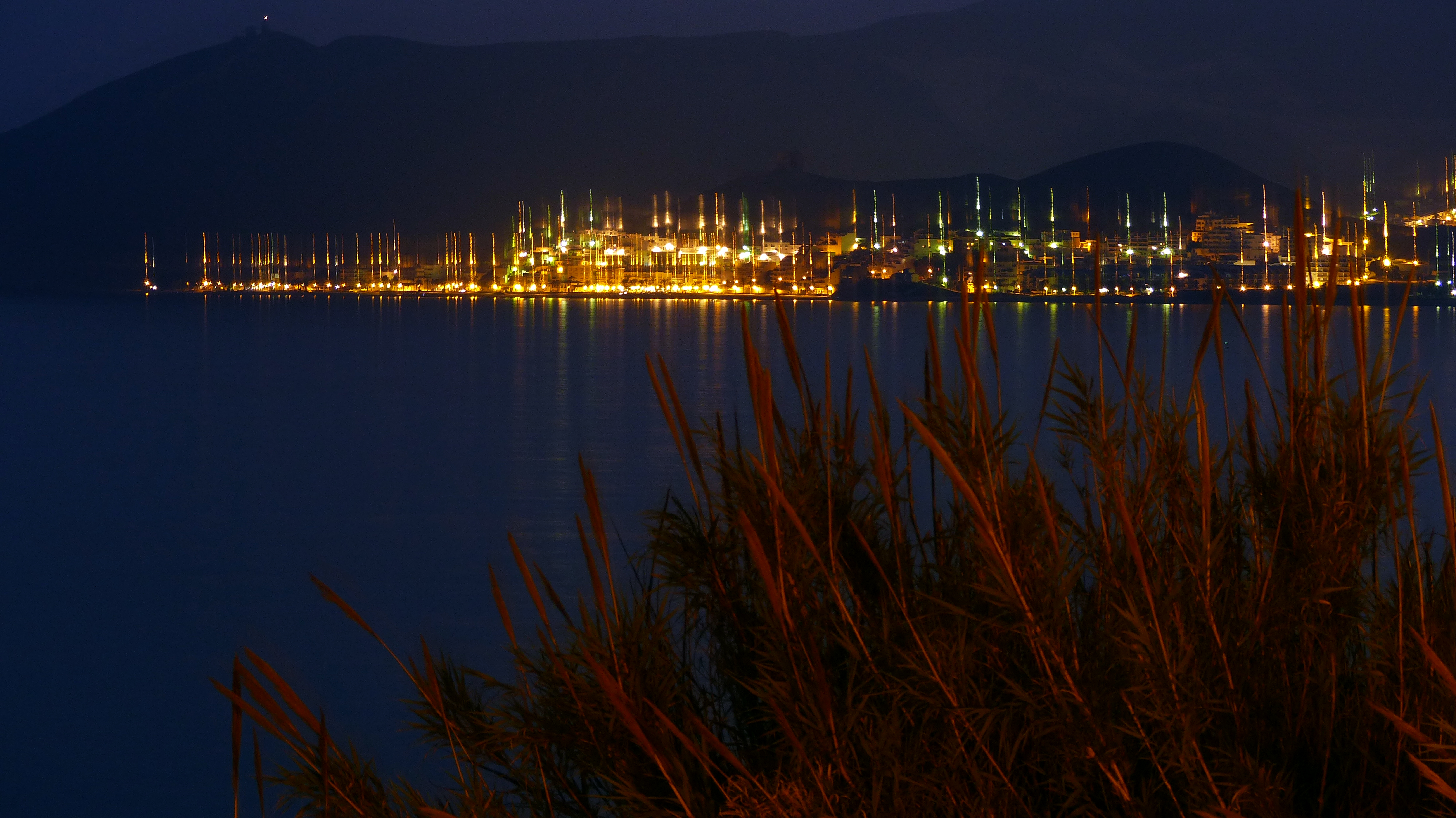 Localidad de Castell de Ferro, en el municipio de Gualchos (Granada, España)